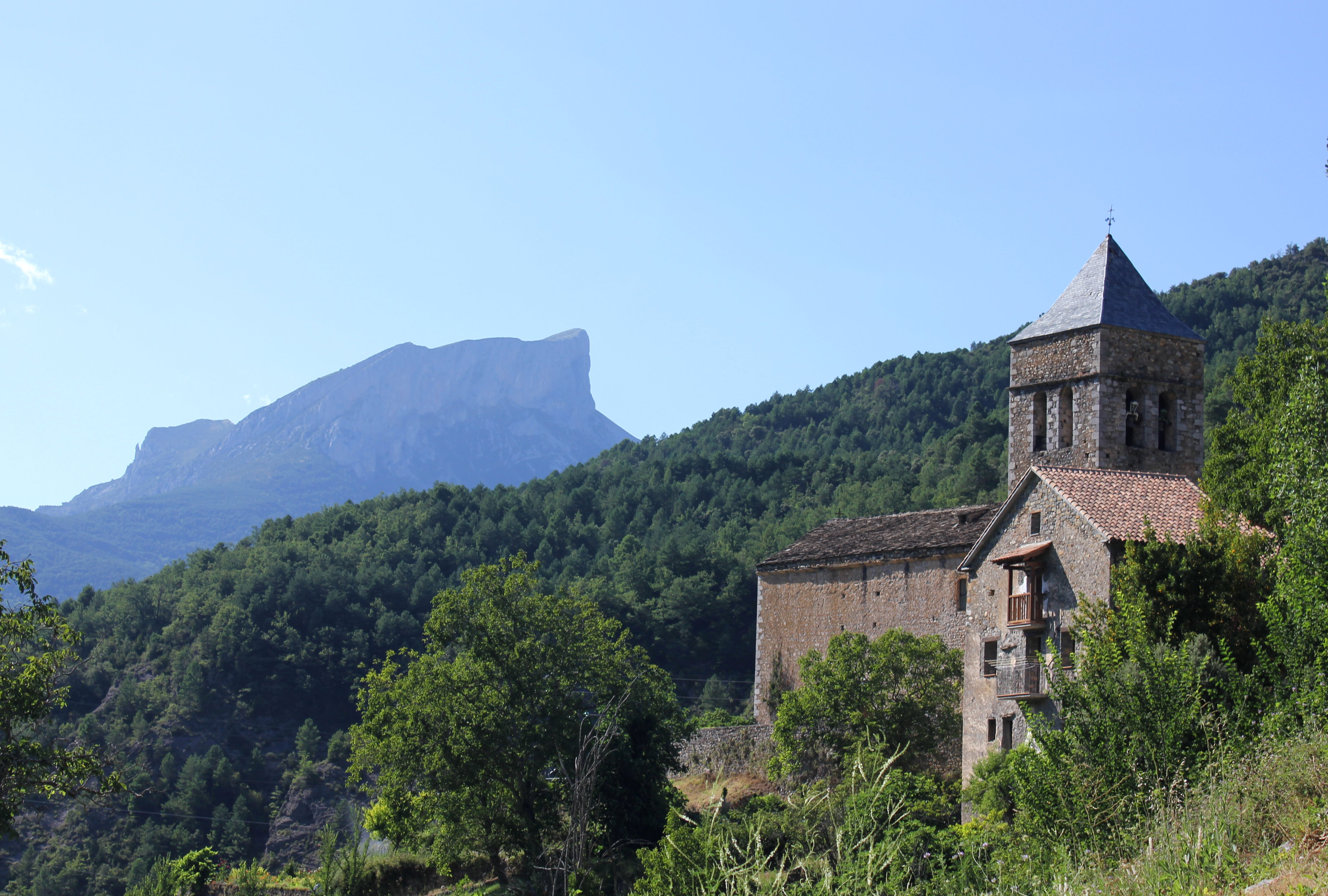 Aragonés: Una imachen de lo cabo de villa de Badaín (Val d'a Cinca, Sobrarbe), con o Castiel Mayor de fundo.